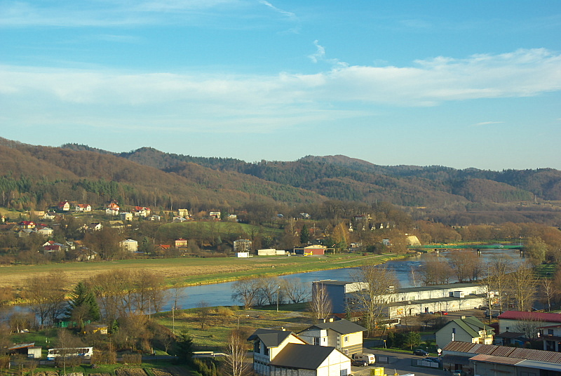 Widok na San i Białą Górę ze wzgórza w Trepczy